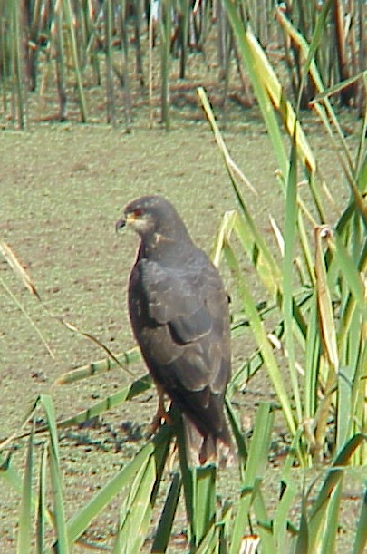 Foto tomada por el autor Fernando Biolé Rostrhamus sociabilis